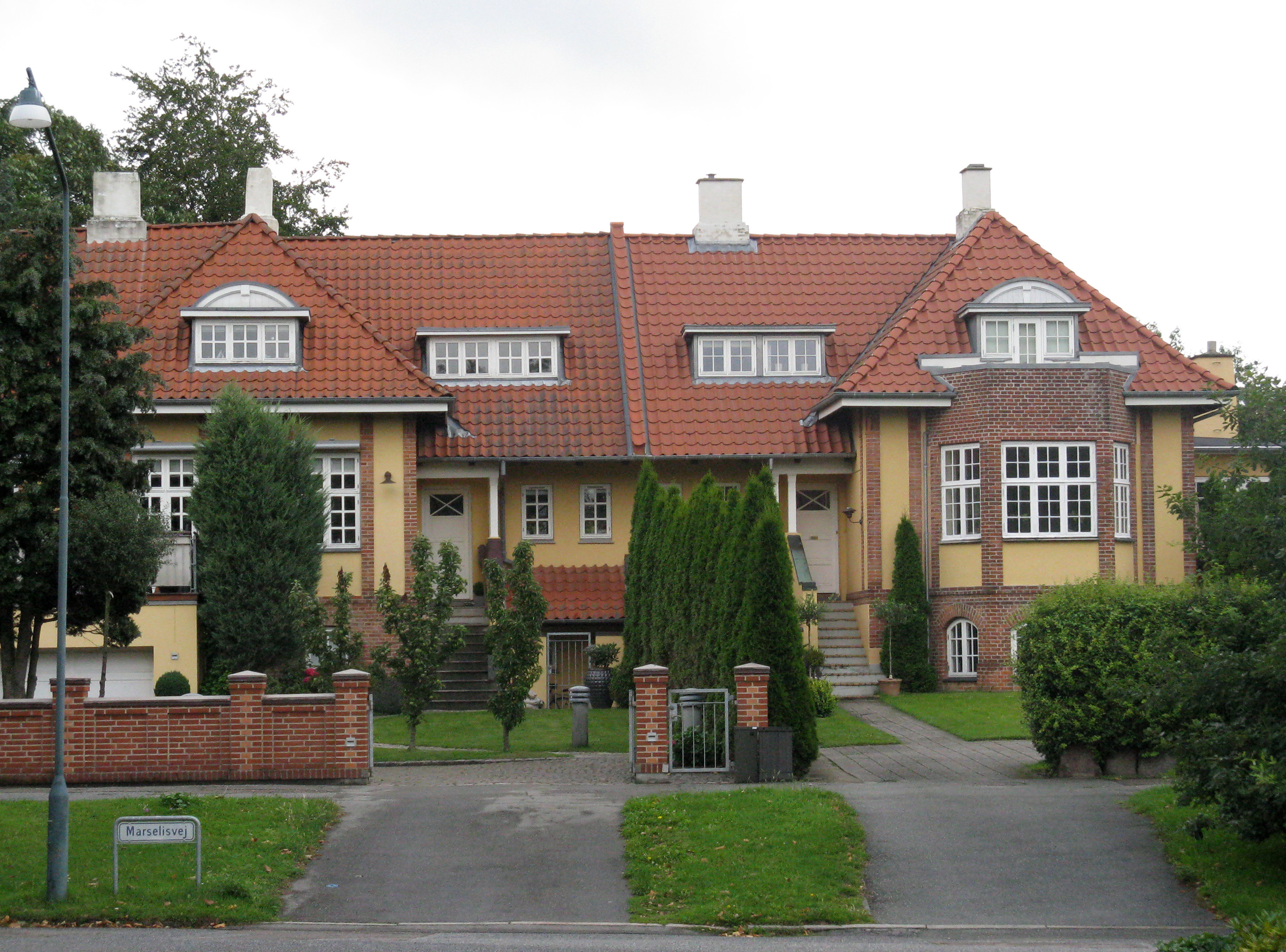 Villa på Marselisvej i Aarhus der var en af hovedpræmierne på Landsudstillingen Aarhus 1909